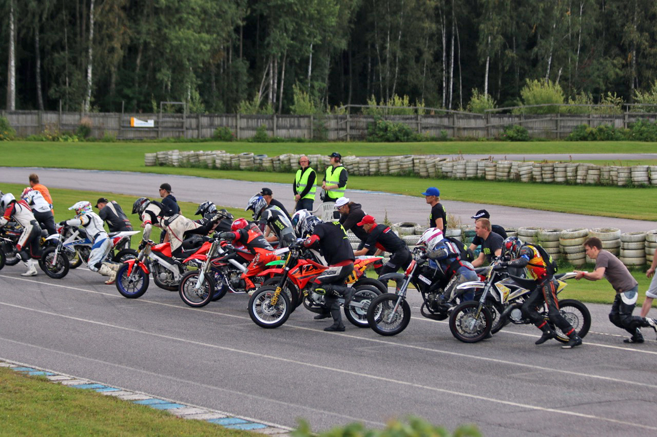 Le Mans tyyppinen lähtö Helsinki MopoGP 2015 kilpailussa.